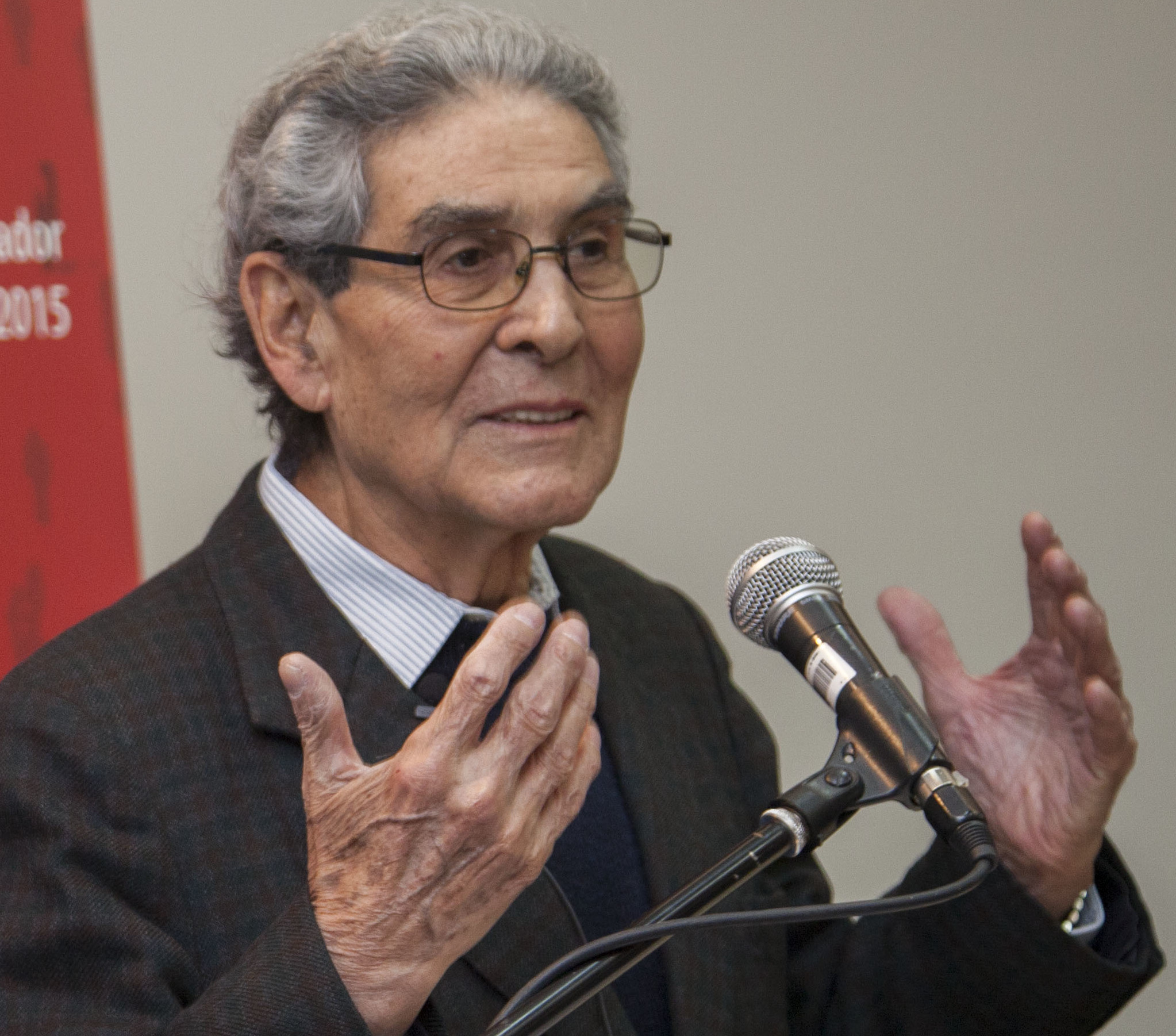 Quito, Ecuador. 25 de agosto de 2015. El Canciller Subrogante, Xavier Lasso inaugura el III Congreso Latinoamericano y Caribeño de Ciencias Sociales, que se realiza en Quito en las instalaciones de FLACSO Ecuador, como parte de la evento se destaca la ponencia magistral del Sociólogo Peruano, Aníbal Quijano. Carlos Pozo / Cancillería Ecuador